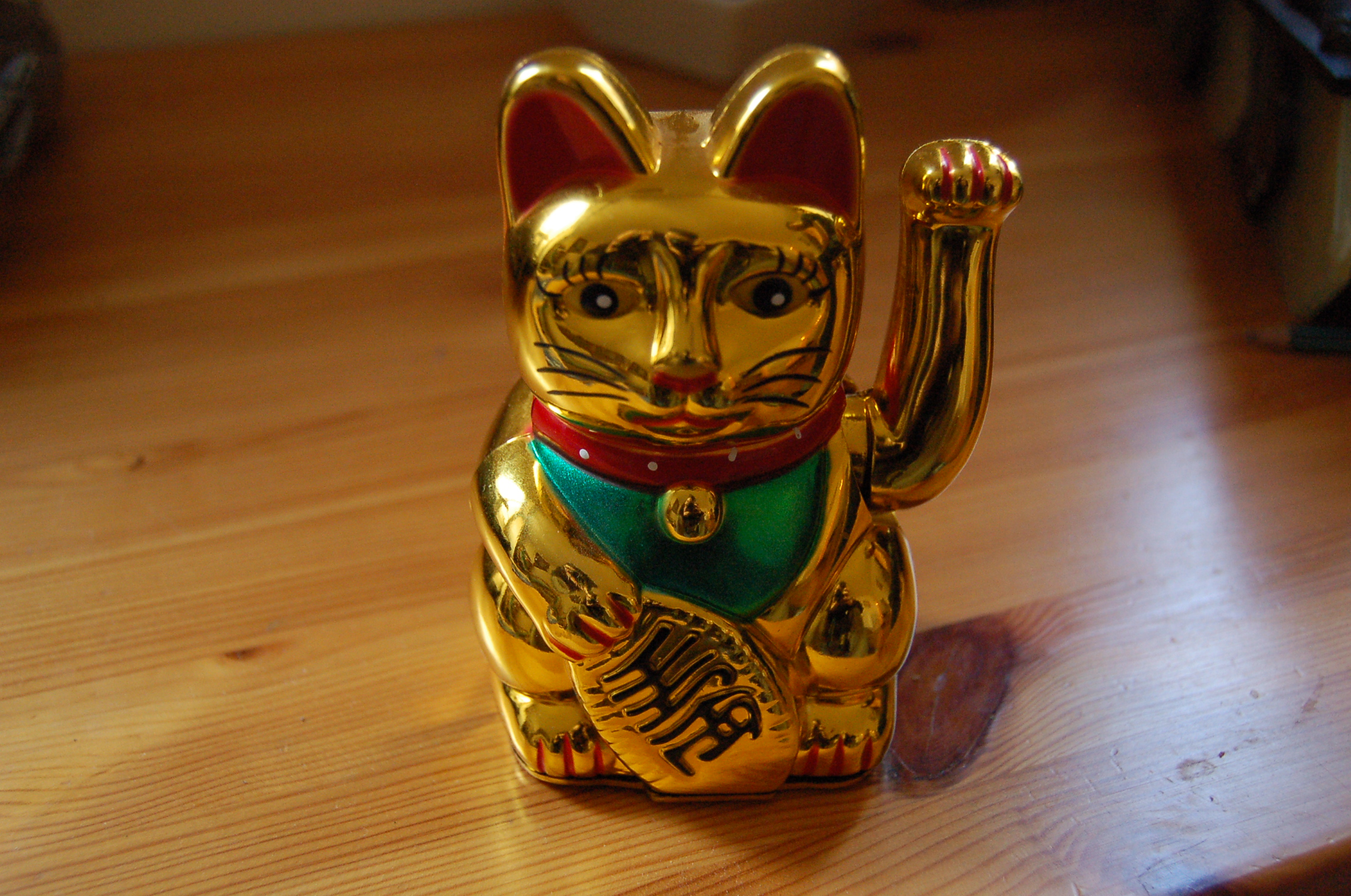 Maneki neko doré